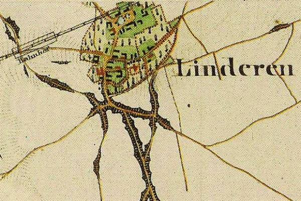 Preußische Kartenaufnahme 1846 - Uraufnahme - (5002 Geilenkirchen)